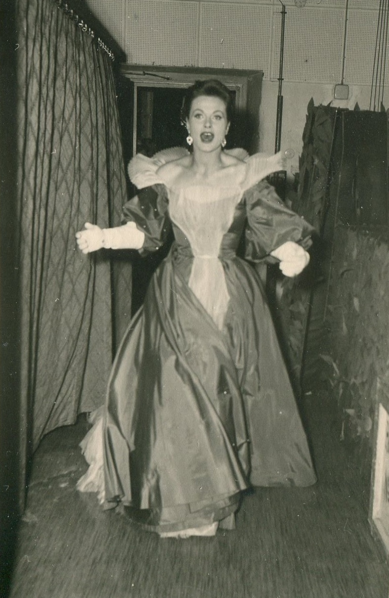 Schauspielerin Marianne Wischmann hinter den Kulissen der Münchner Kammerspiele bei der Kortner-Inszenierung Was ihr wollt. In Eile, da sie sich zwischen zwei Auftritten schnell umziehen muss.